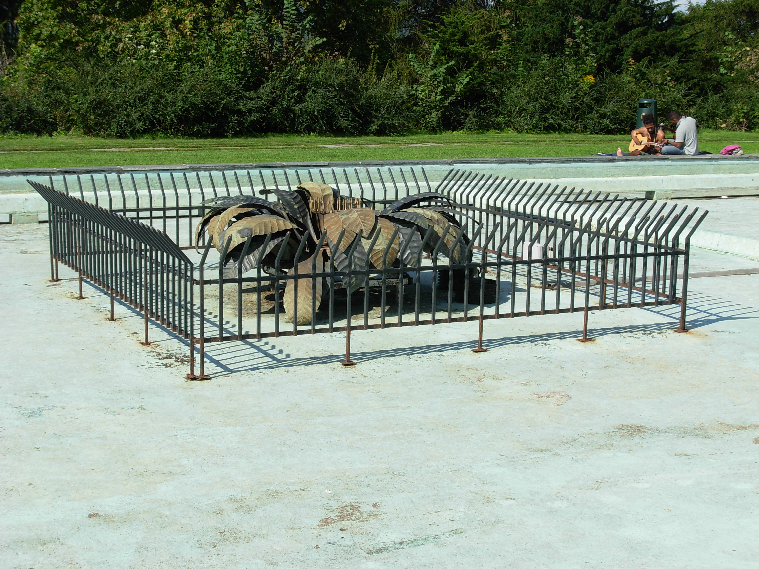 Fonteneskulptur, St. Hanshaugen, Oslo